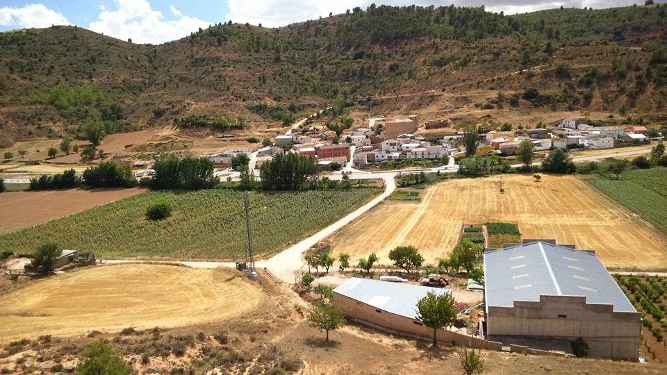 Imagen panorámica (Valdecolmenas de Arriba)